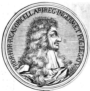 Portrait of Orazio Ricasoli Rucellai (1604-1673)